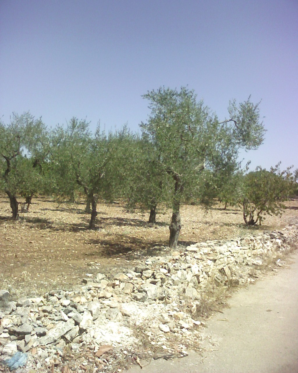 campagna-ulivi - Modugno (bari)-Italy